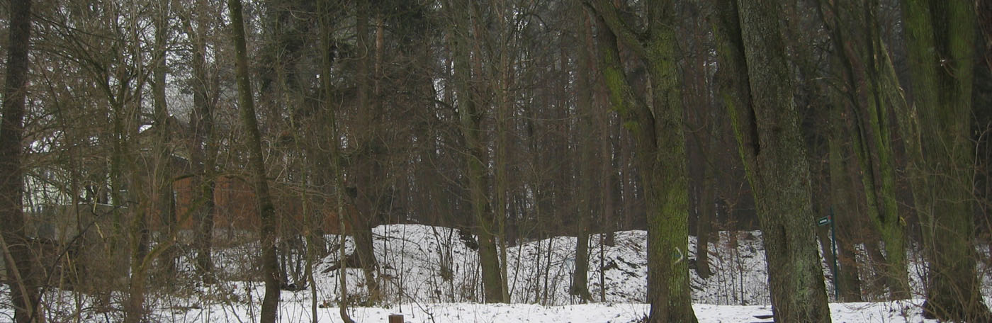 Stadtpark in Pinkafeld, Burgenland, Austria